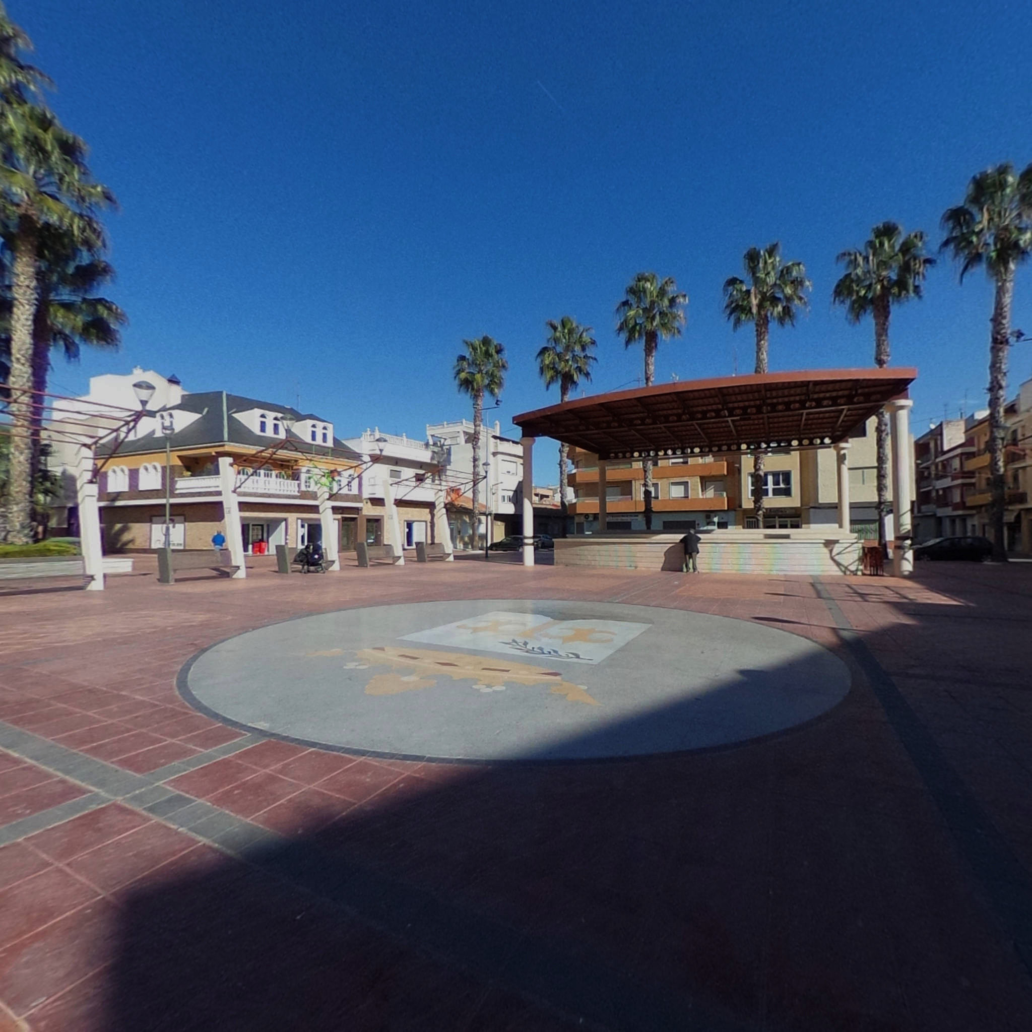 Rafal - Templete de música en Plaza de España